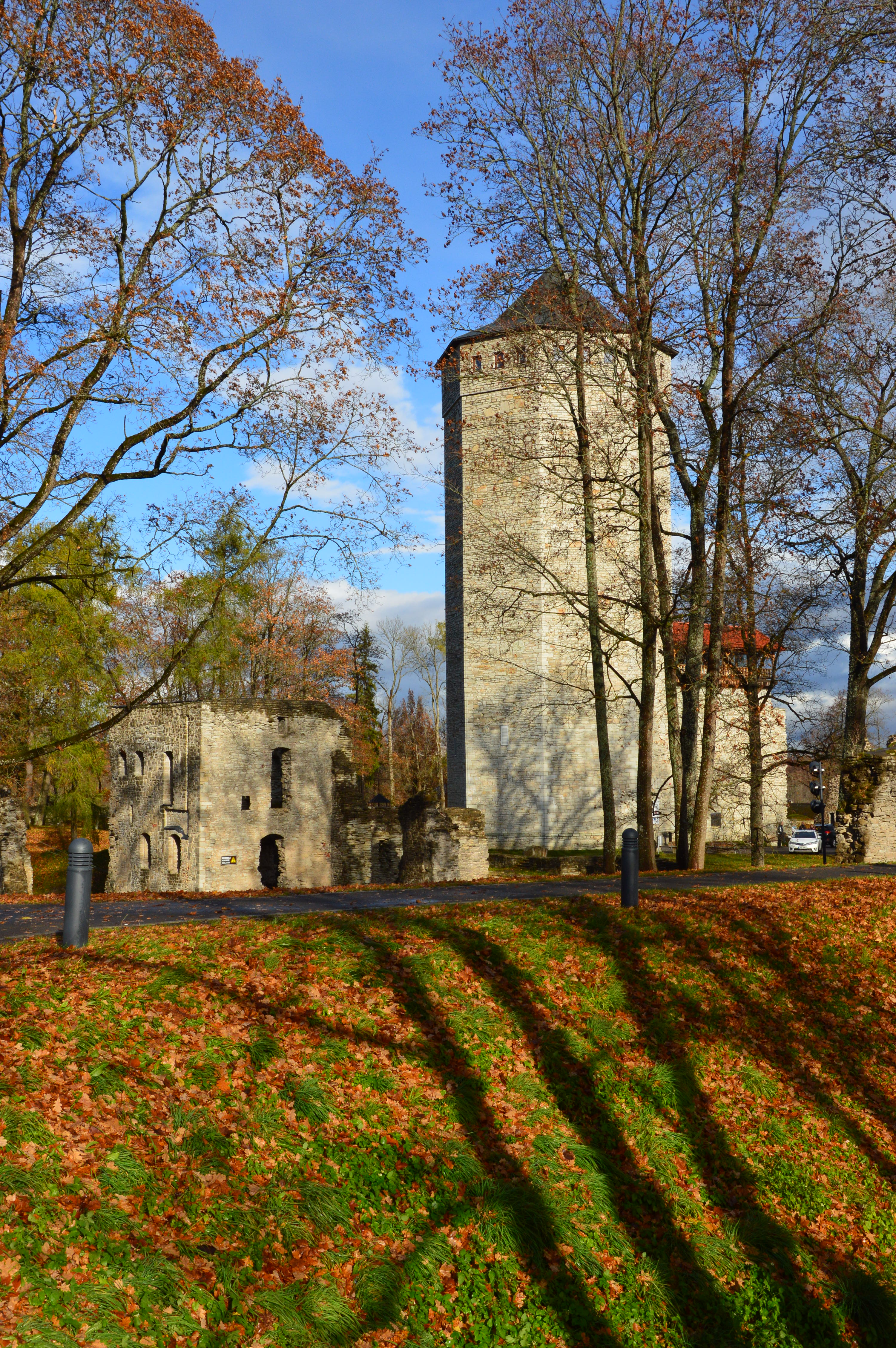 Paide Vallimägi sügisel.